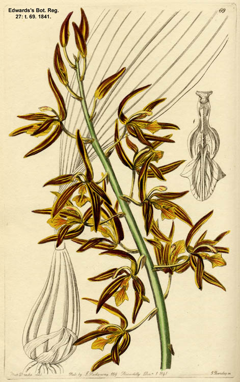 Braemia vittata (as syn. Houlletia vittata)